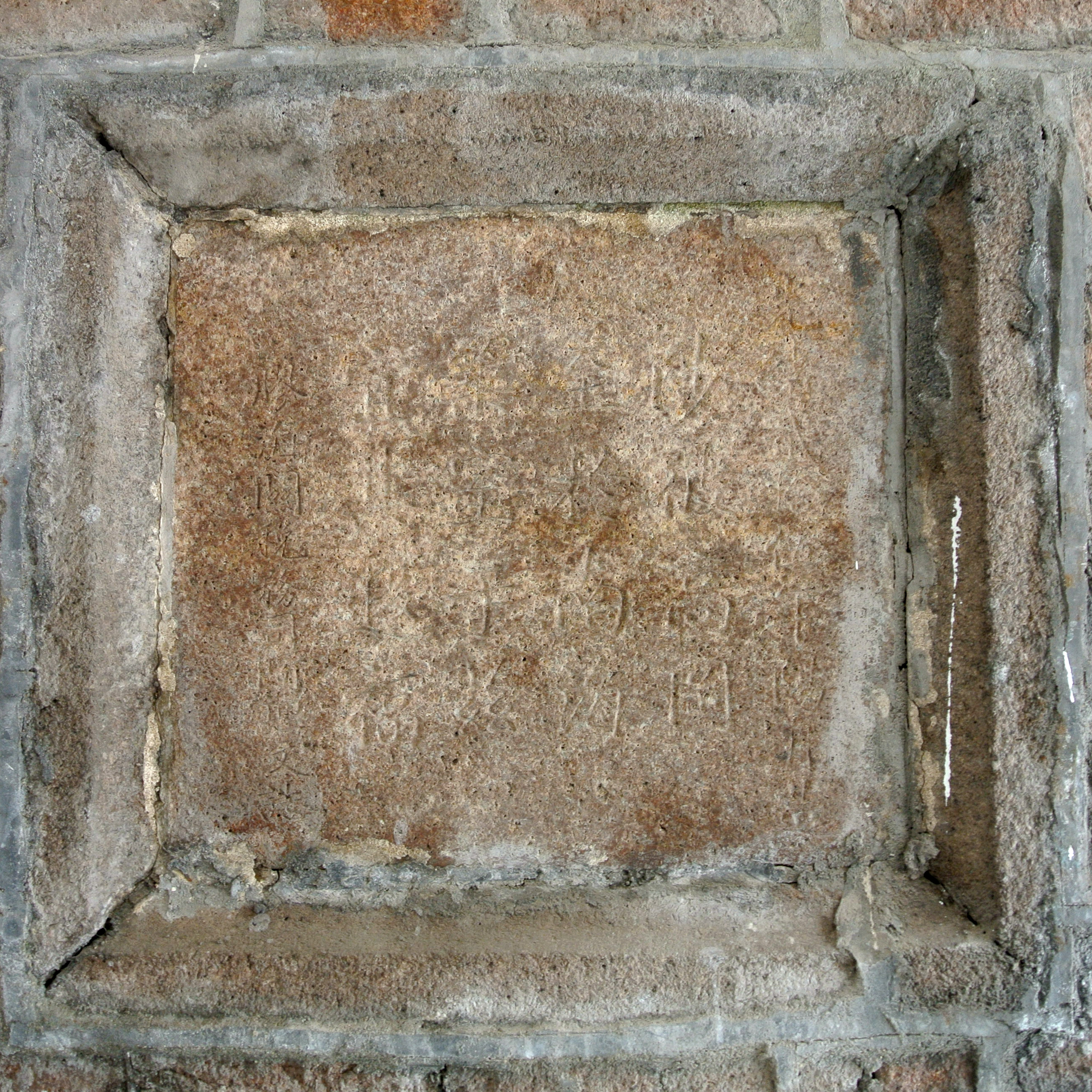 青岛阿理文旧宅建造纪念碑 剪裁调整版